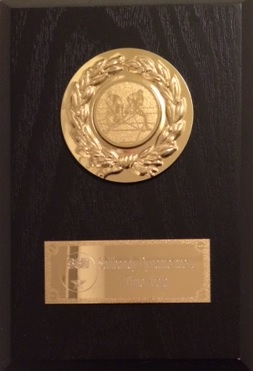 SC Dynamon kunniaplaketti